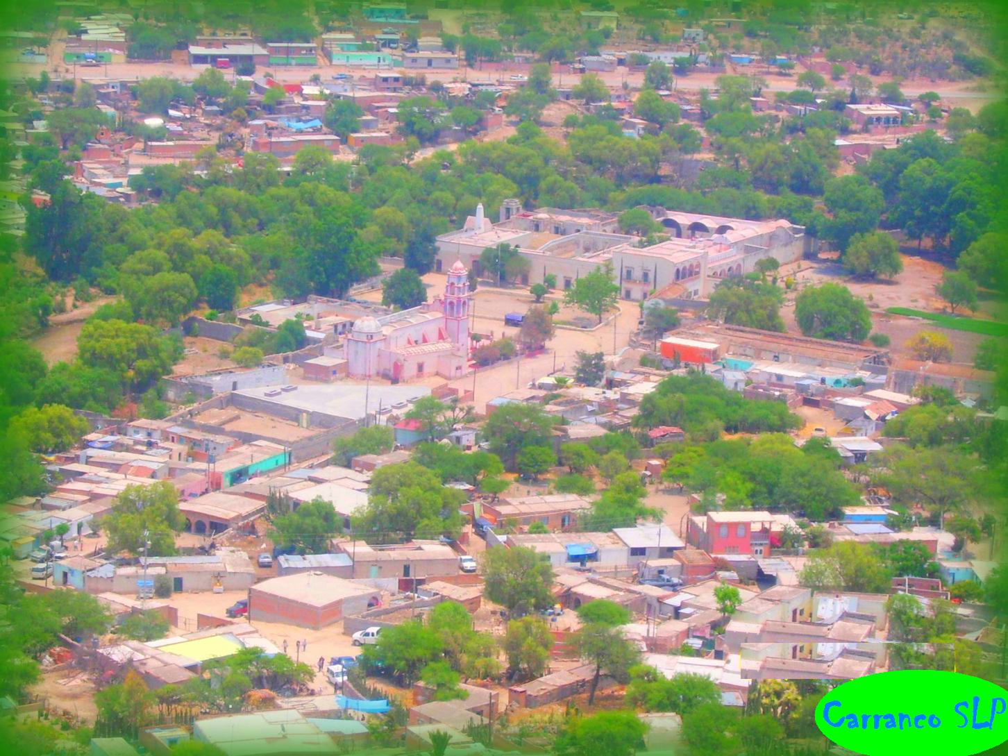 Carranco villa de reyes San Luis Potosi